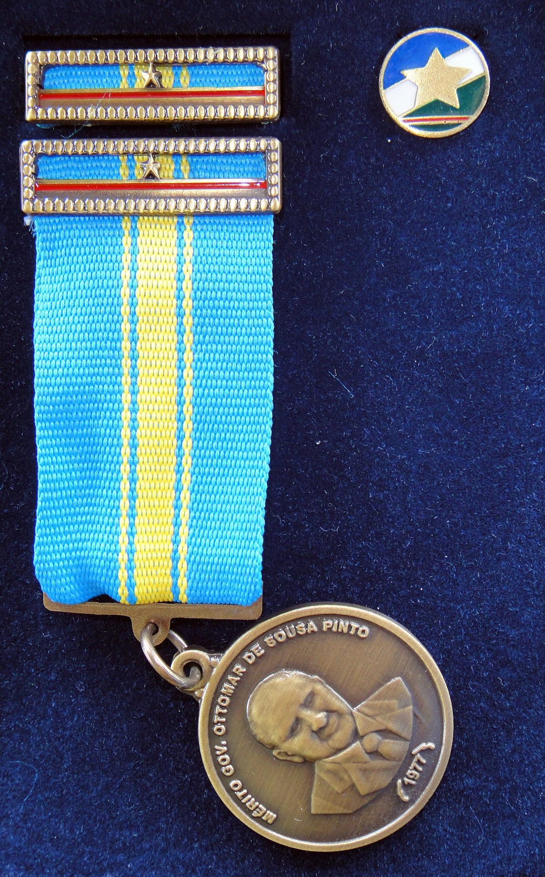 Distinção concedida pelo Governo do Estado de Roraima, Brasil. A 'Medalha de Honra ao Mérito Ottomar de Sousa Pinto criada pelo Governo do Estado de Roraima, Brasil, por meio do Decreto nº 8.616, de 18 de janeiro de 2008 para distinguir personalidades civis ou militares que tenhas prestado relevantes serviços ao Estado ou à Casa Militar do Estado de Roraima.